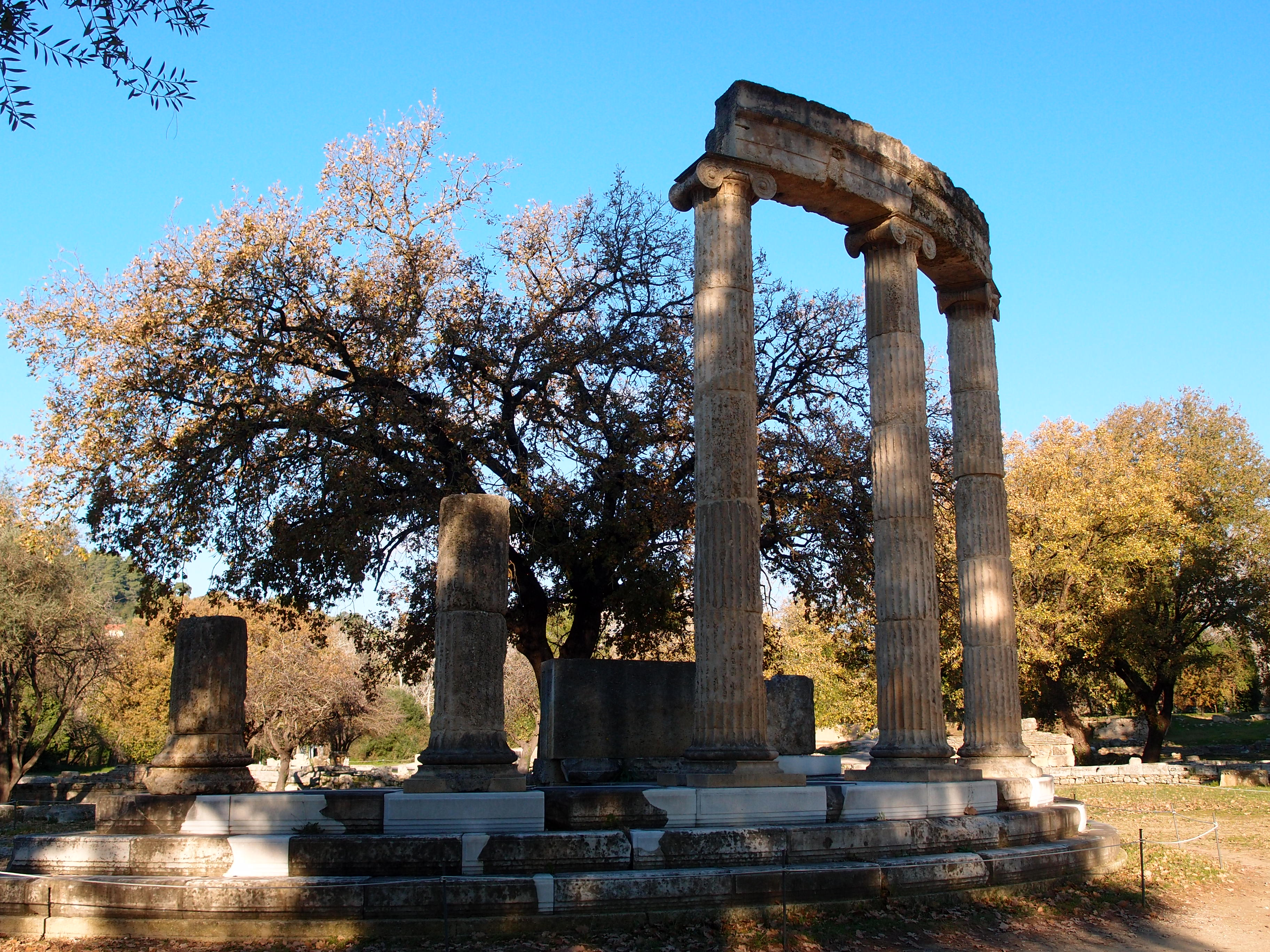 フィリッポス2世の建てたフェリペイオン